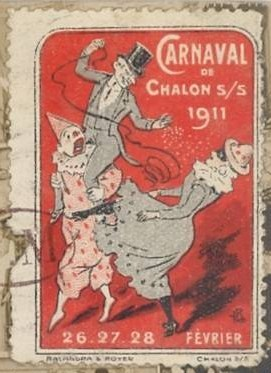 Vignette commémorative du Carnaval de Chalon-sur-Saône 1911.